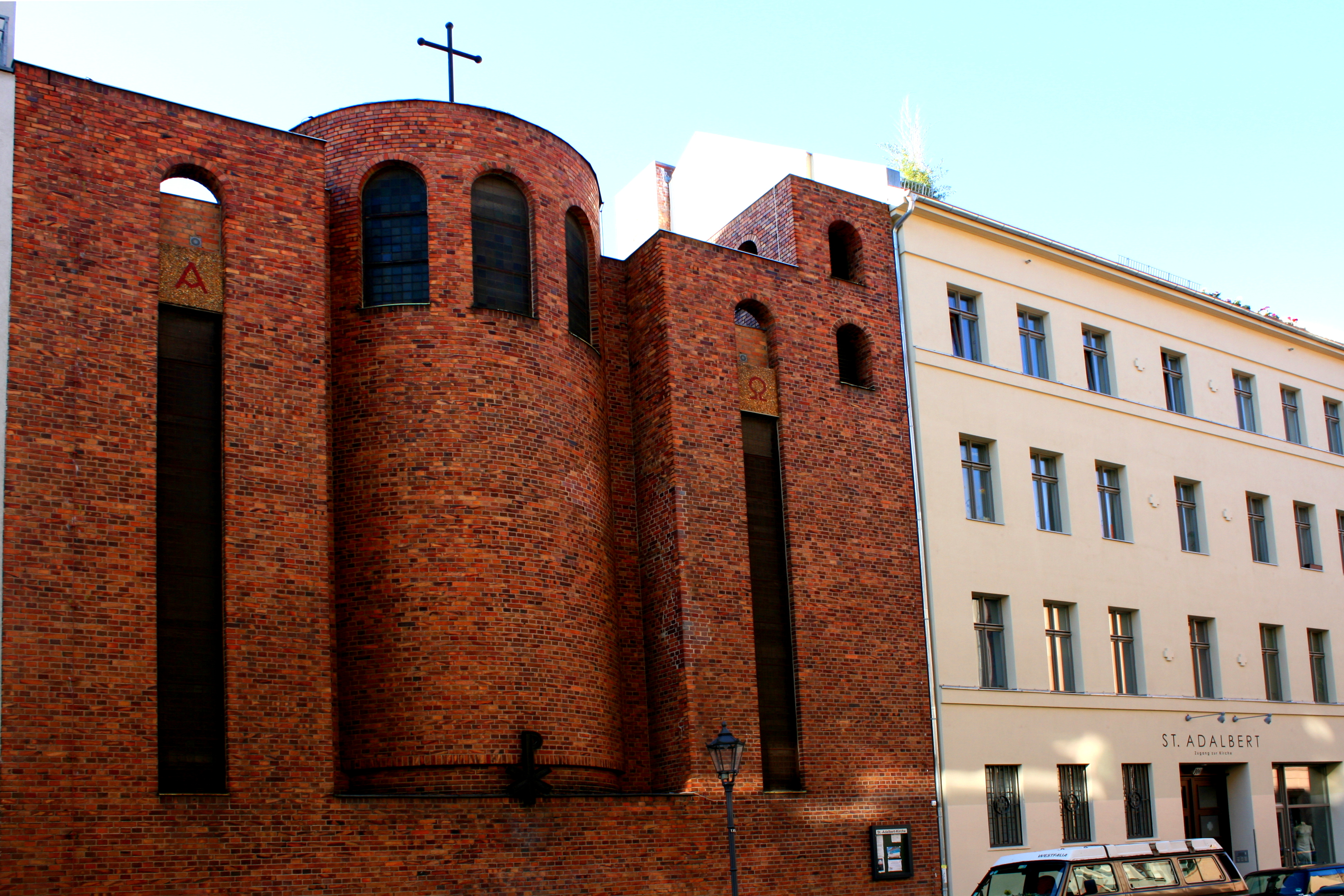 St.-Adalbert-Kirche (Fassade) in der Linienstraße in Berlin Mitte